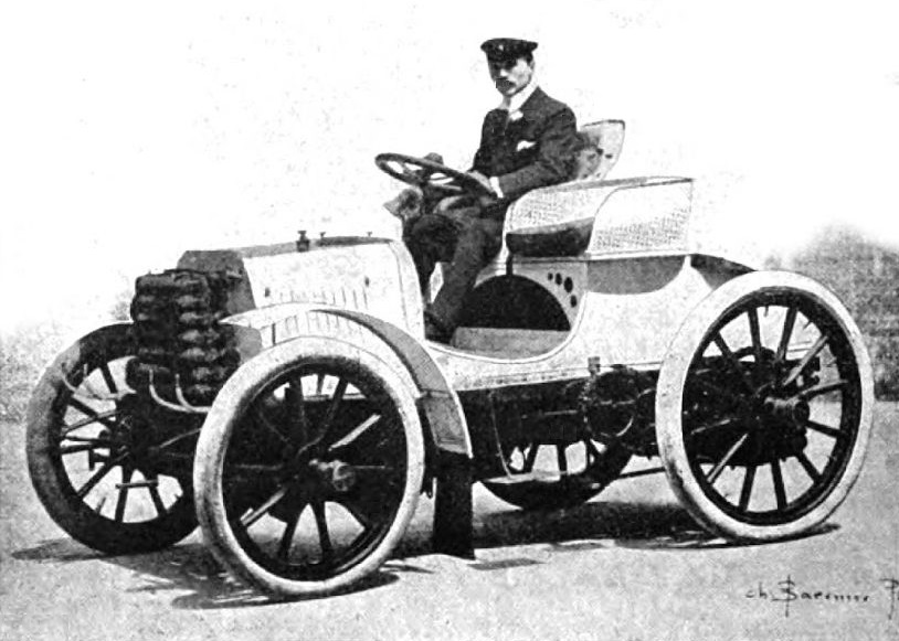 Fernand Charron, vainqueur de Paris-Amsterdam-Paris en 1898 sur Panhard et Levassor.